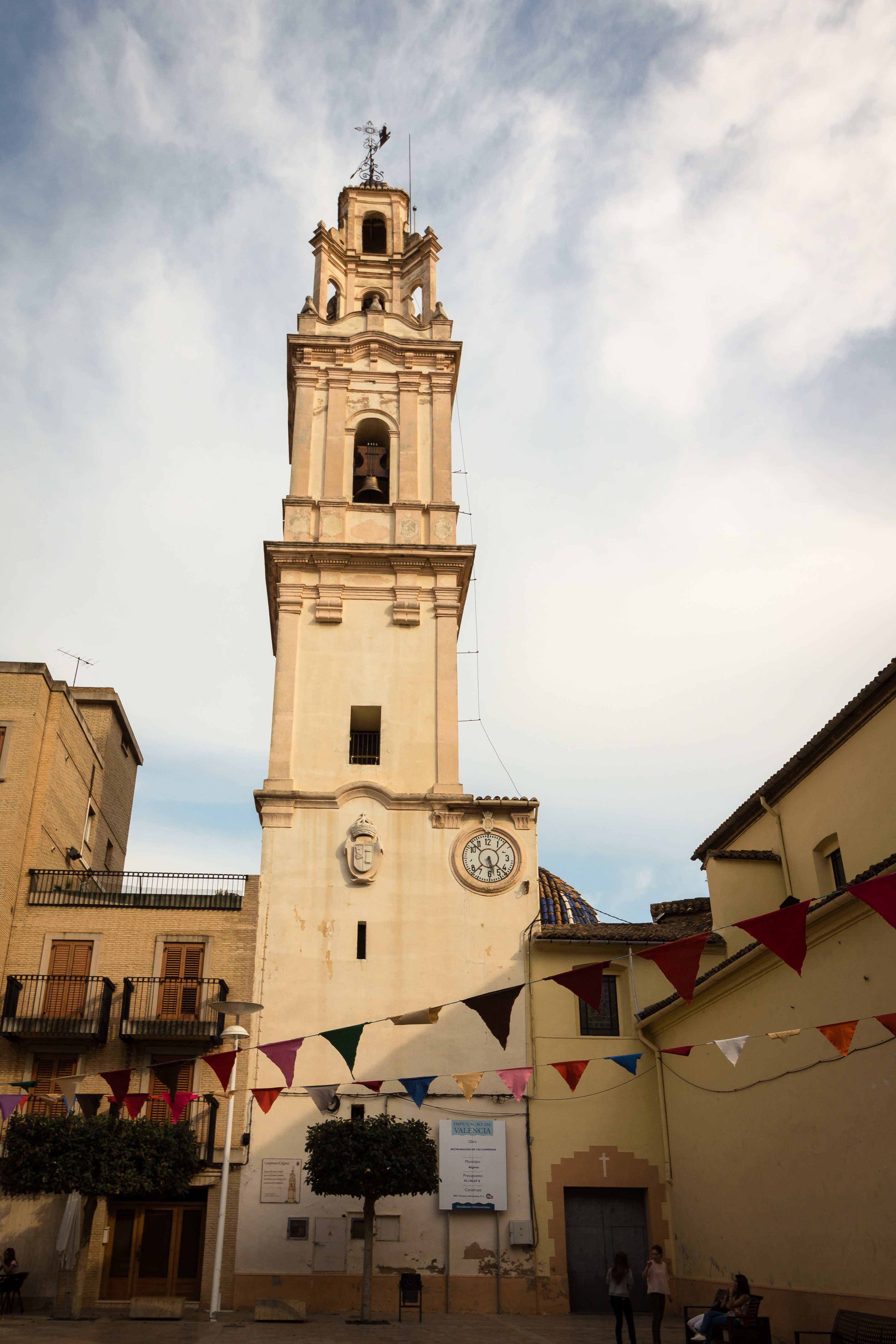 Iglesia Parroquial de San Antonio Abad 20.031-001.